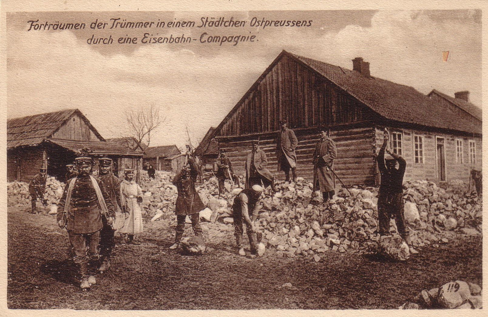 Postkarte zum Wiederaufbau Ostpreußens im Ersten Weltkrieg